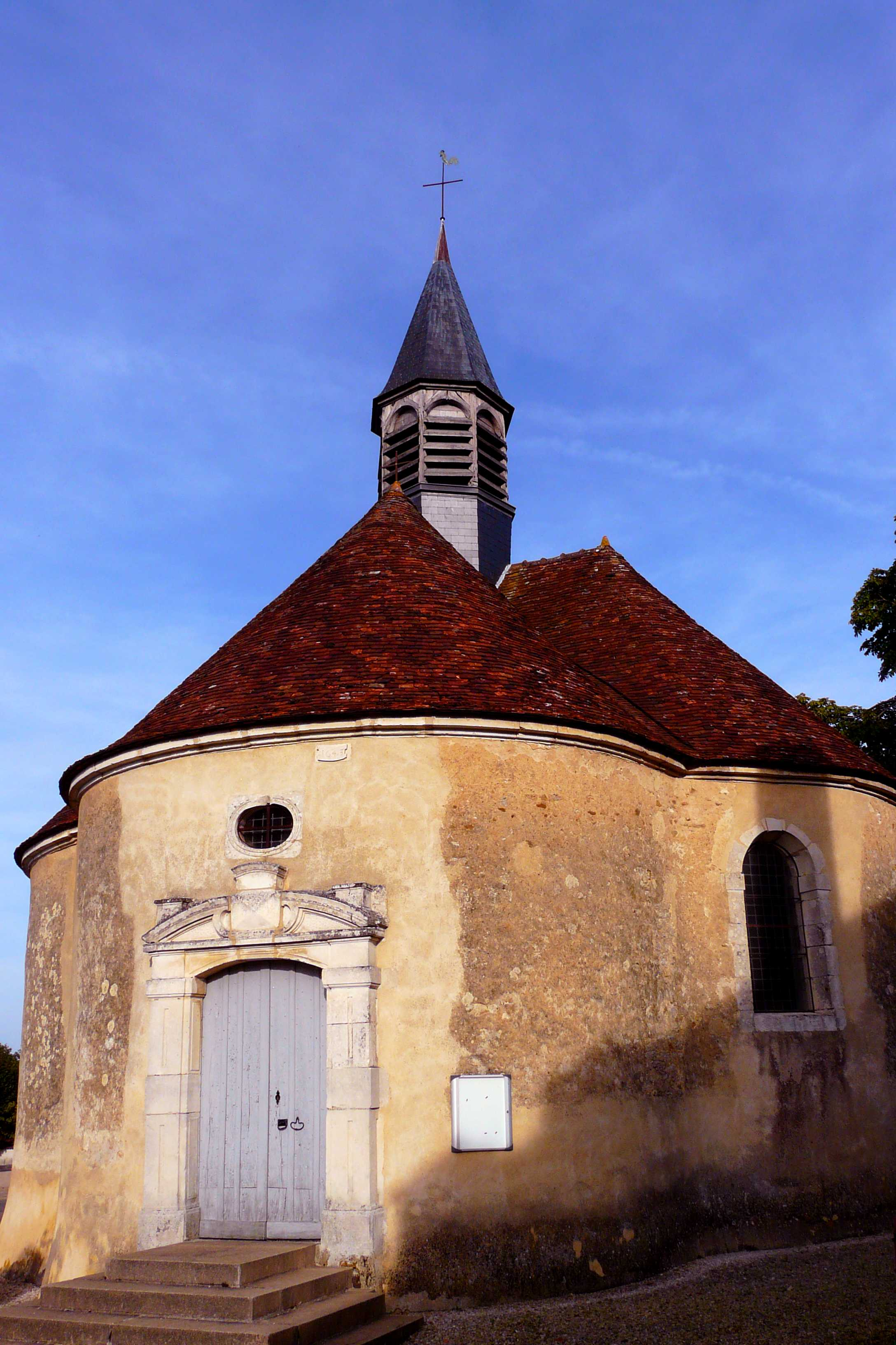 Église de Bernouil (Classé) .